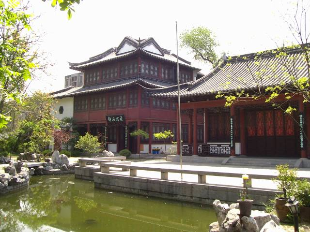 静海寺 2004年4月16日撮影 撮影者:権作 参照：